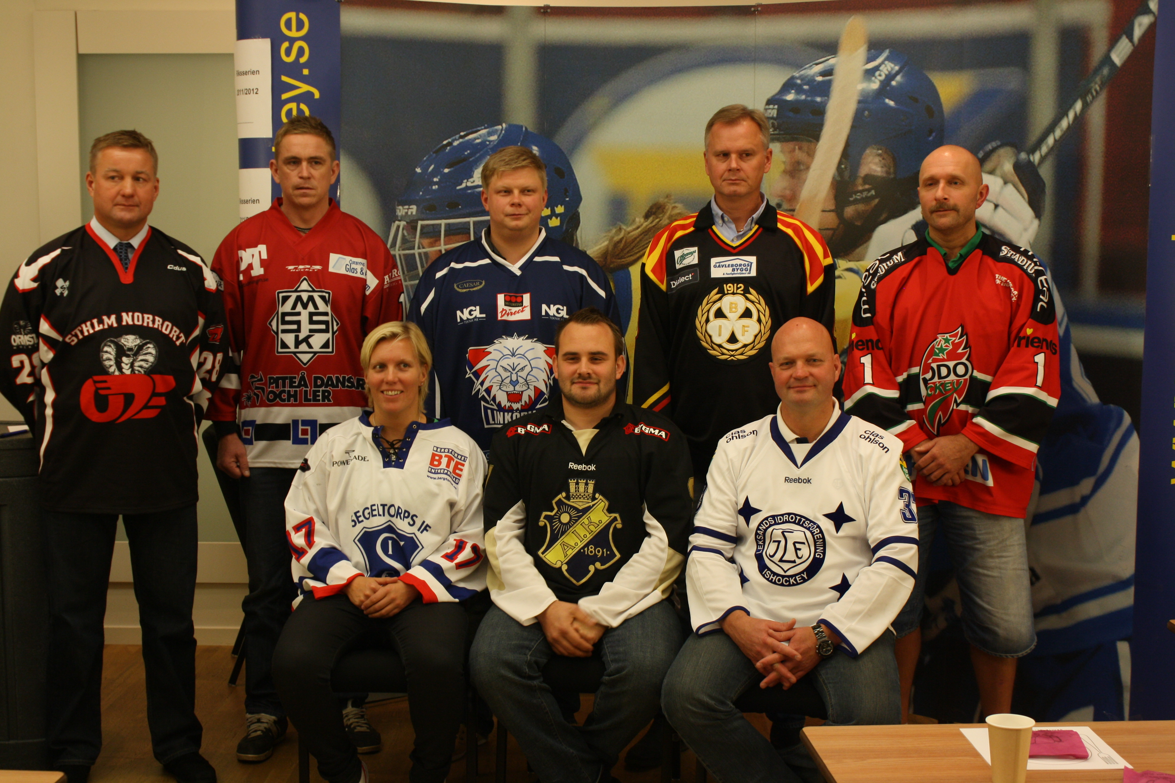 Tränarna för lagen i Riksserien 2011/12 vid upptaktsträffen. Övre raden från vänster: Alexey Salomatin, Ormsta HC, Jörgen Jönsson, Munksund/Skuthamns SK, Jens Brändström, Linköpings HC, Magnus Grönlund, Brynäs IF, Ulf Hermansson, (lagledare) MODO Hockey. Nedre raden från vänster: Ylva Lindberg, Segeltorps IF, Rickard Regnell, AIK IF, Ulf Hedberg, Leksands IF.